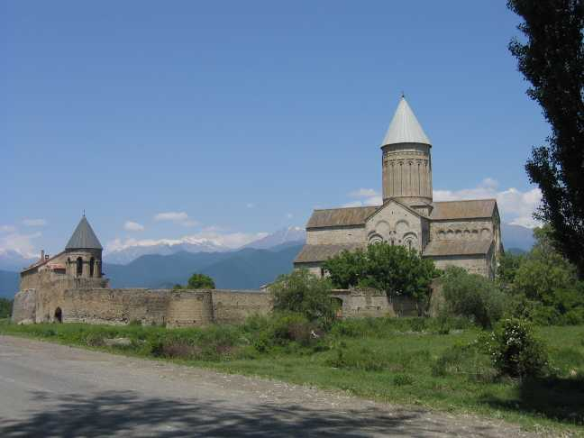 Kathedrale von Alaverdi, Kacheti, Georgien.